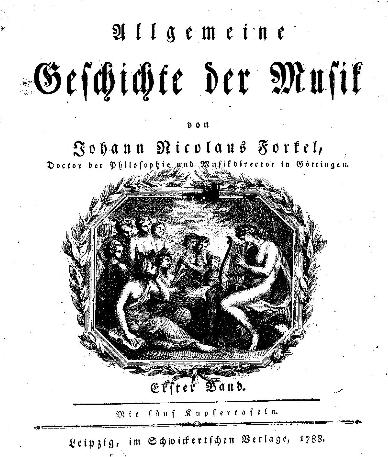 요한 포르켈의 "일반음악의 역사"